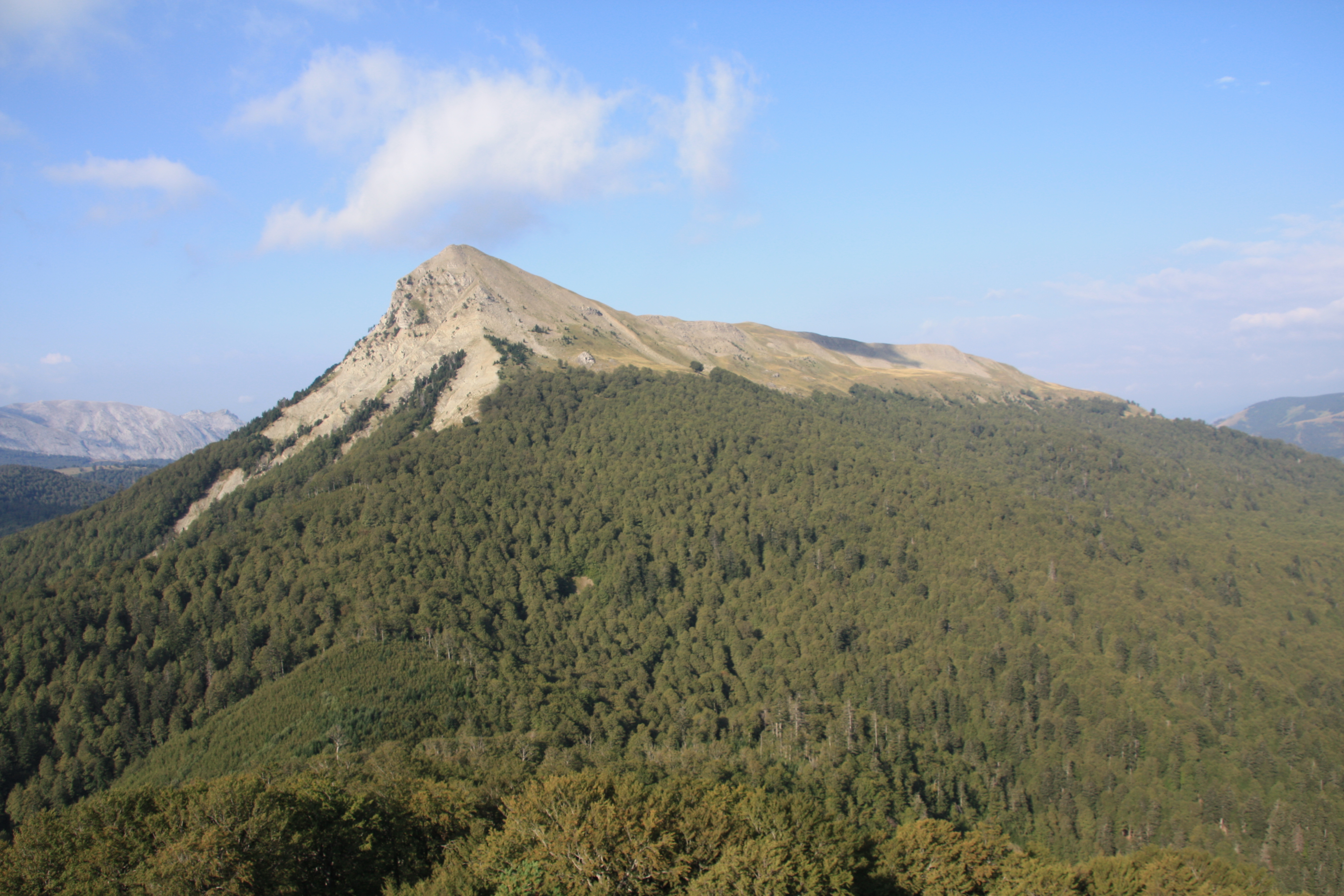 Txamantxoiaren ikuspegia Aragoi aldean dagoen Peña del Reyko tontorretik.